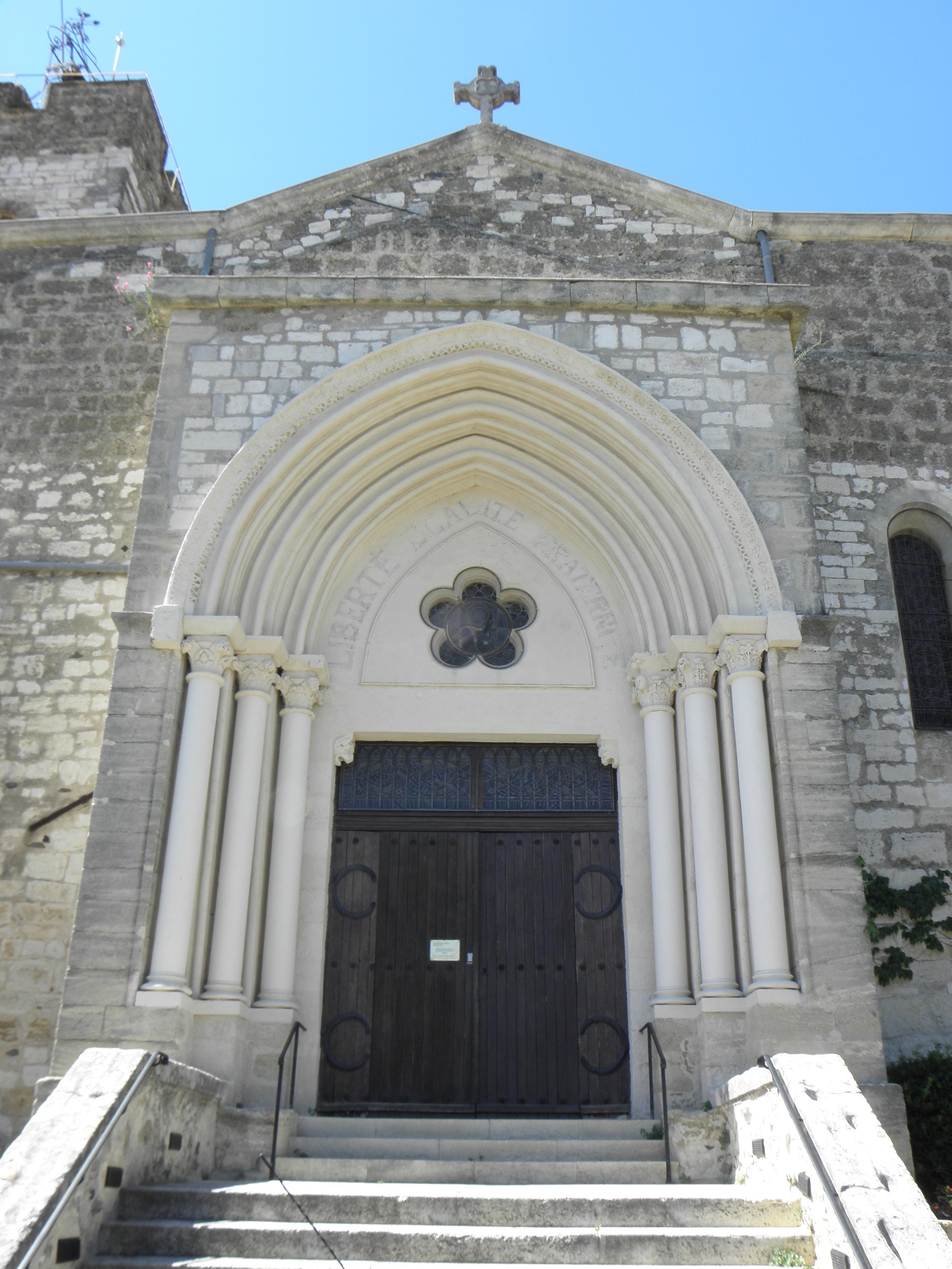 Église Saint-Étienne de Montferrier-sur-Lez (34). Portail sud.